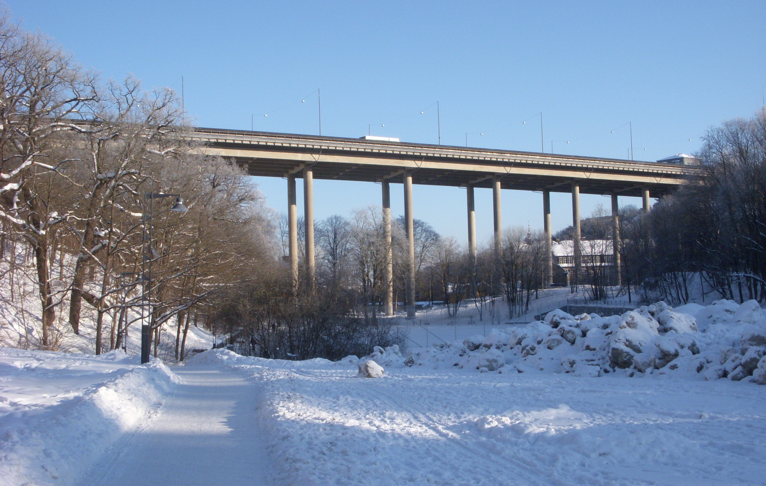 Blommensbergsviadukten i Stockholm